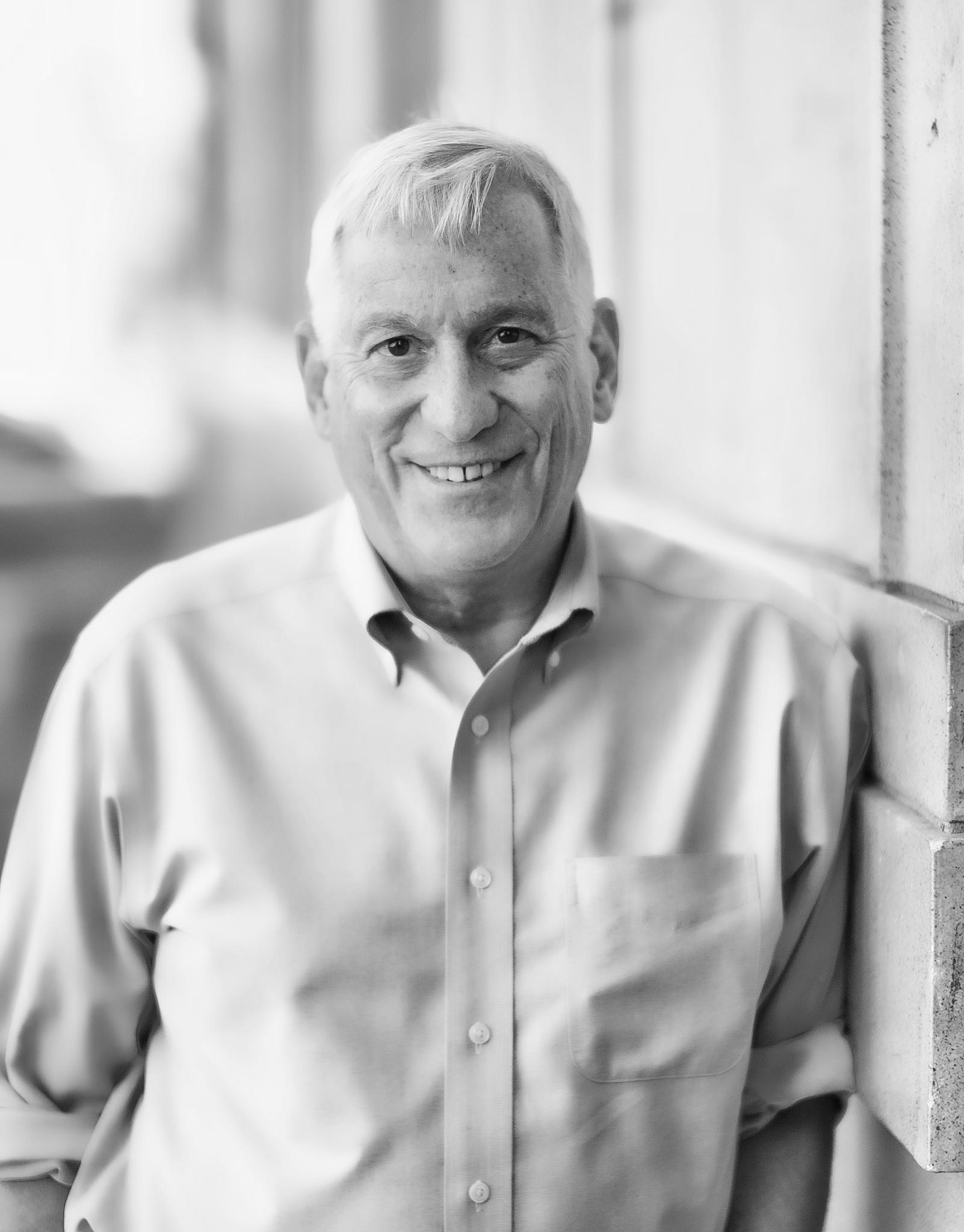 Walter Isaacson